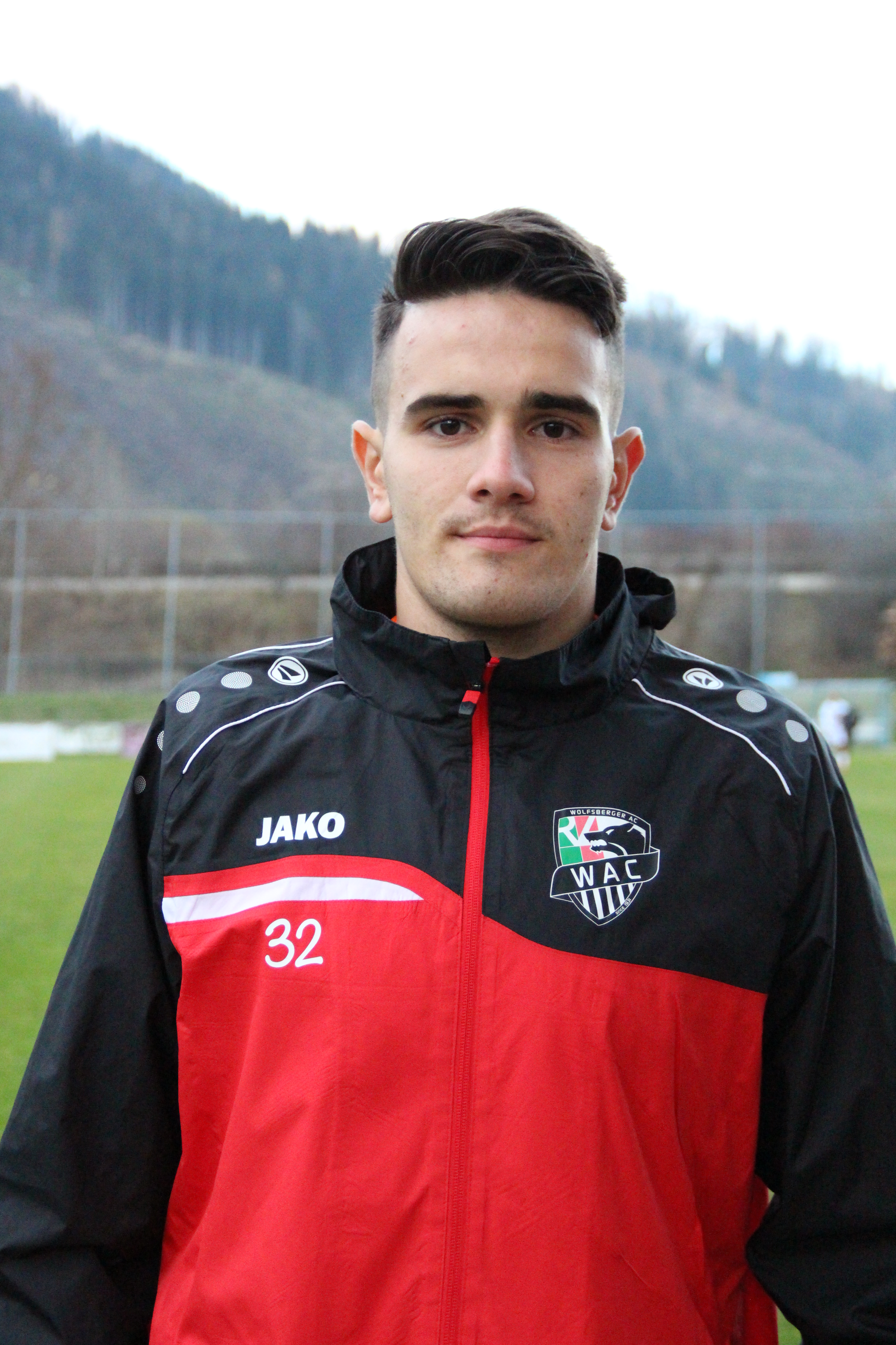 Marko Soldo (WAC)